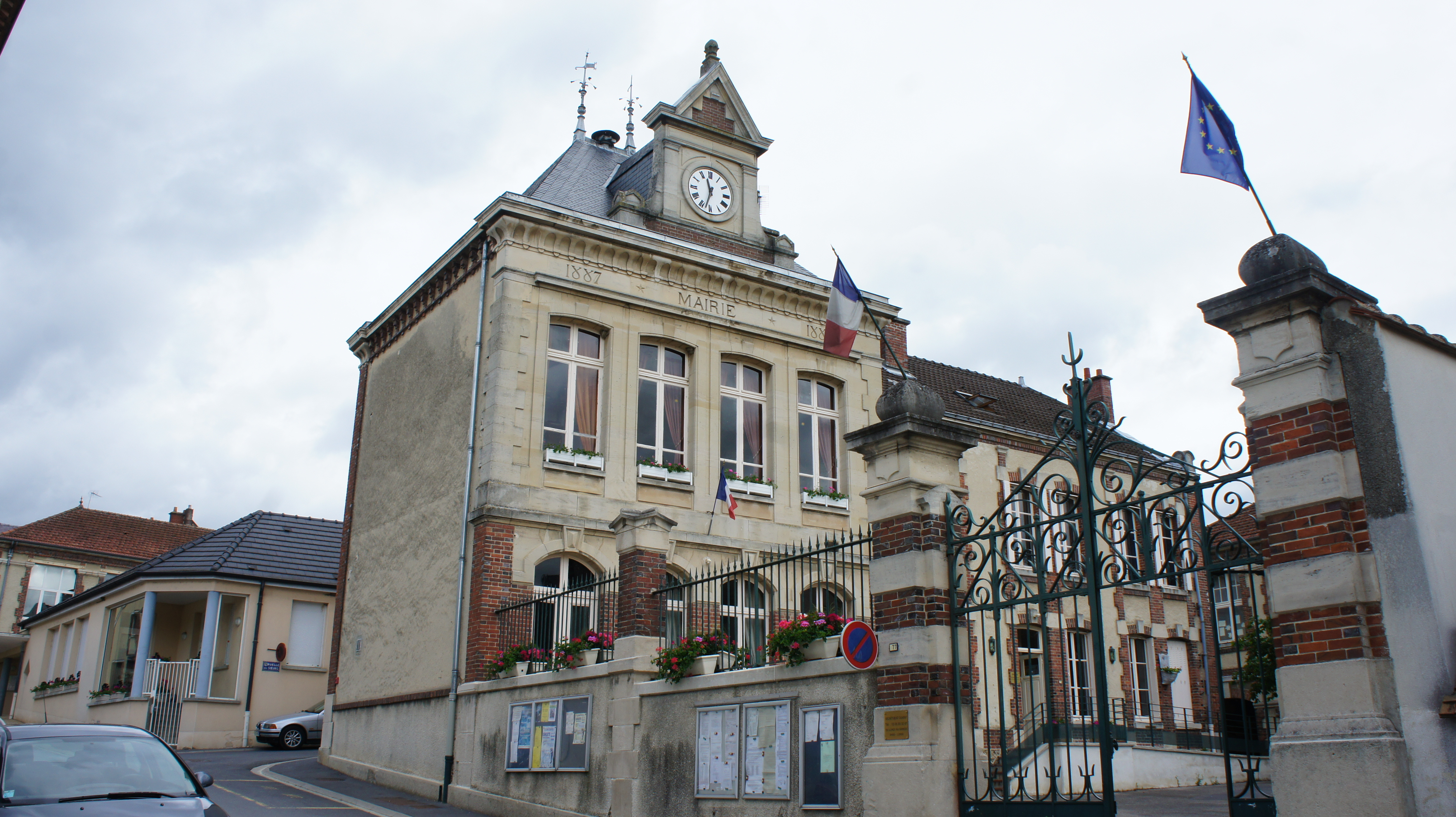 à Cumières .